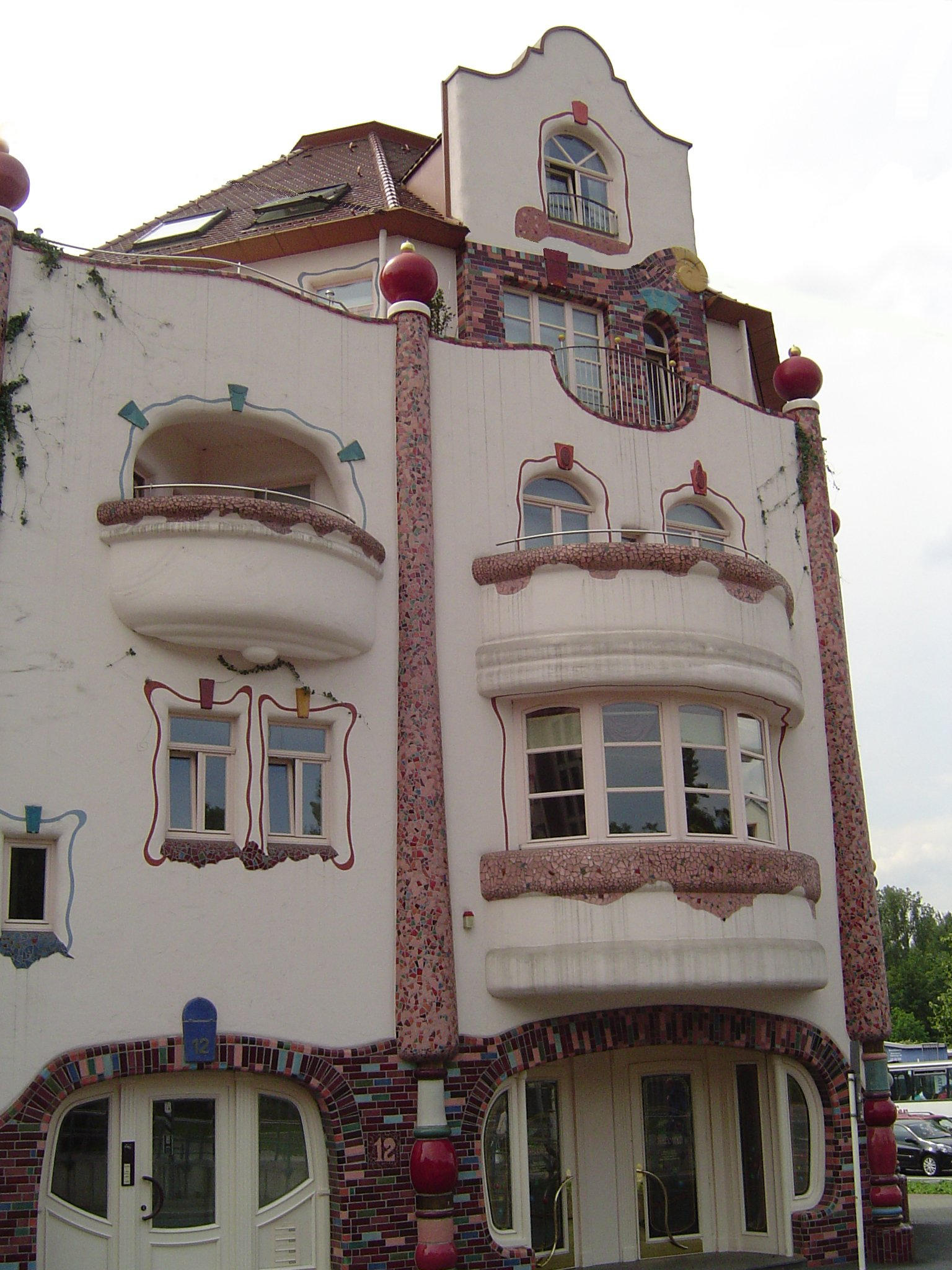 Haus im Stil Hundertwasser in Dortmund-Aplerbeck